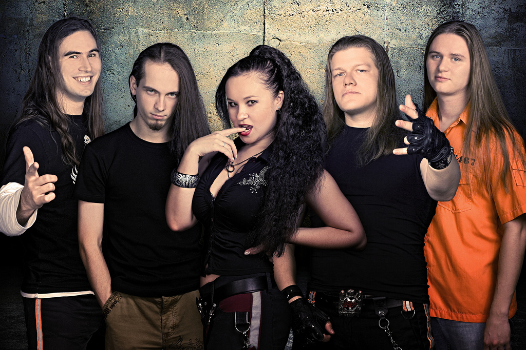 Xe-NONE 2010